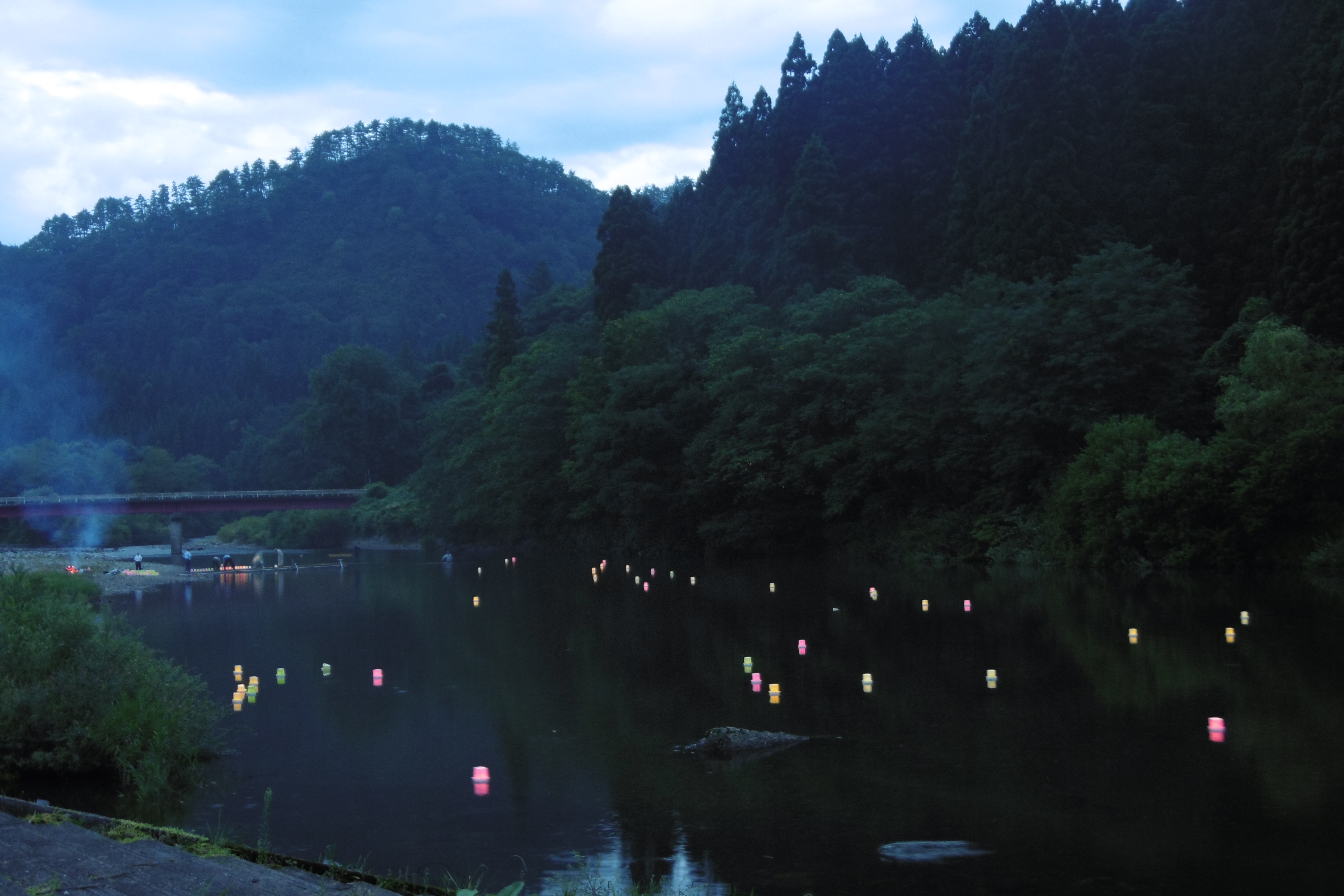 阿仁の灯篭流し